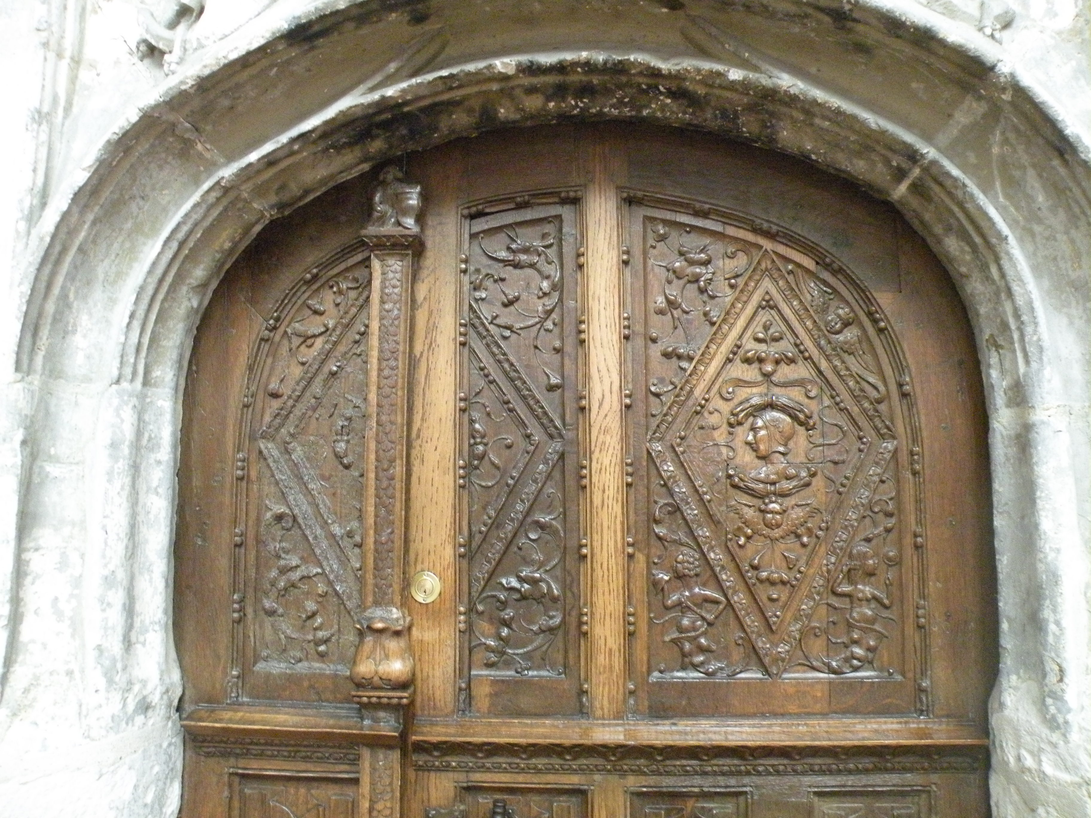 Beauvais (Oise, France), église St Ḗtienne, détail de la porte de la sacristie.